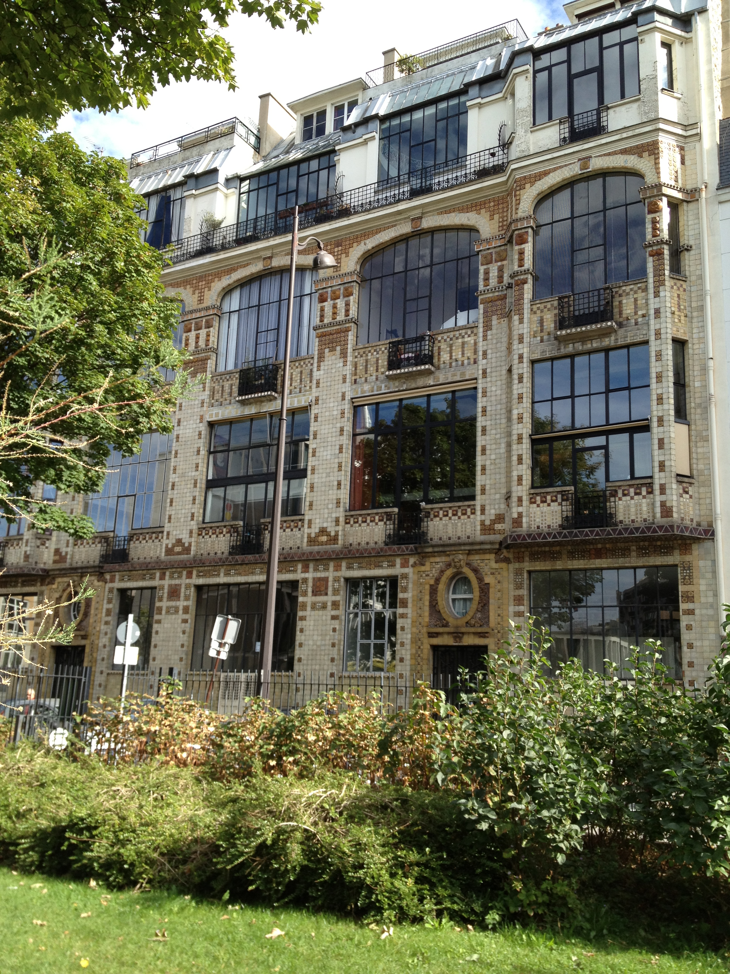 31-31 bis rue Campagne-Première, à Paris (France). Immeuble art déco de l'architecte André Arfvidson et du céramiste Alexandre Bigot